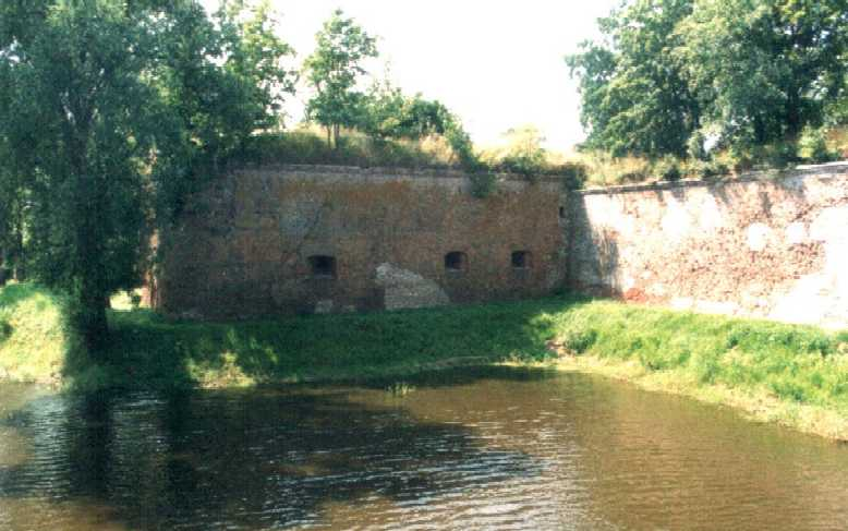 Festung/Altstadt Küstrin - Bastion "Philipp" vom Kietzer Tor gesehen